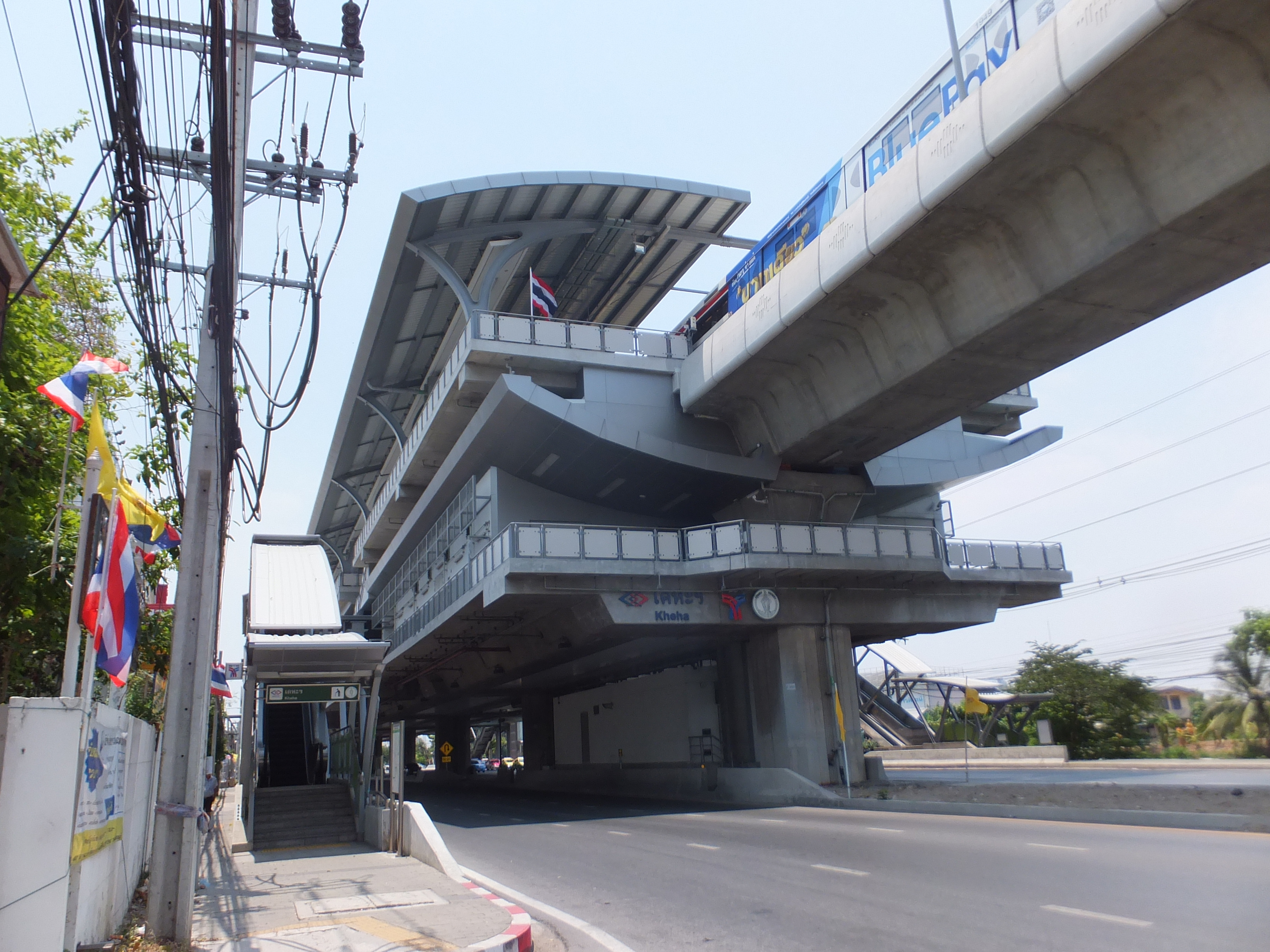 BTSケーハ駅。画像は南端かつ西側の入口。